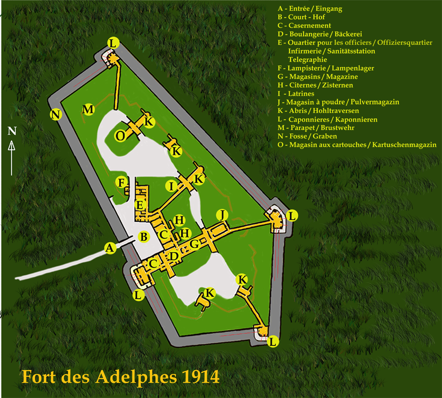 Fort des Adelphes (Place fortifée d'Épinal)